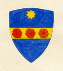 Stemma della famiglia Cecconi